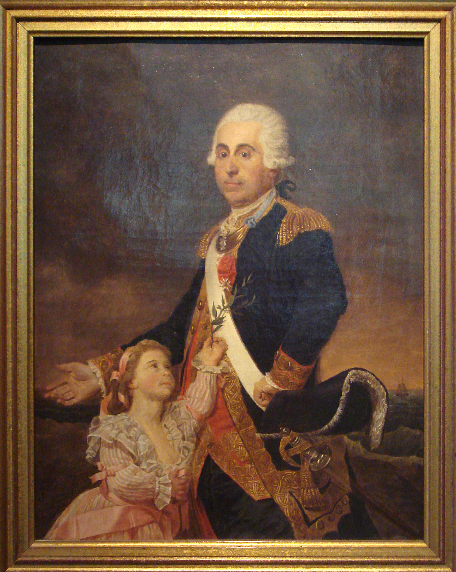 Self-portrait